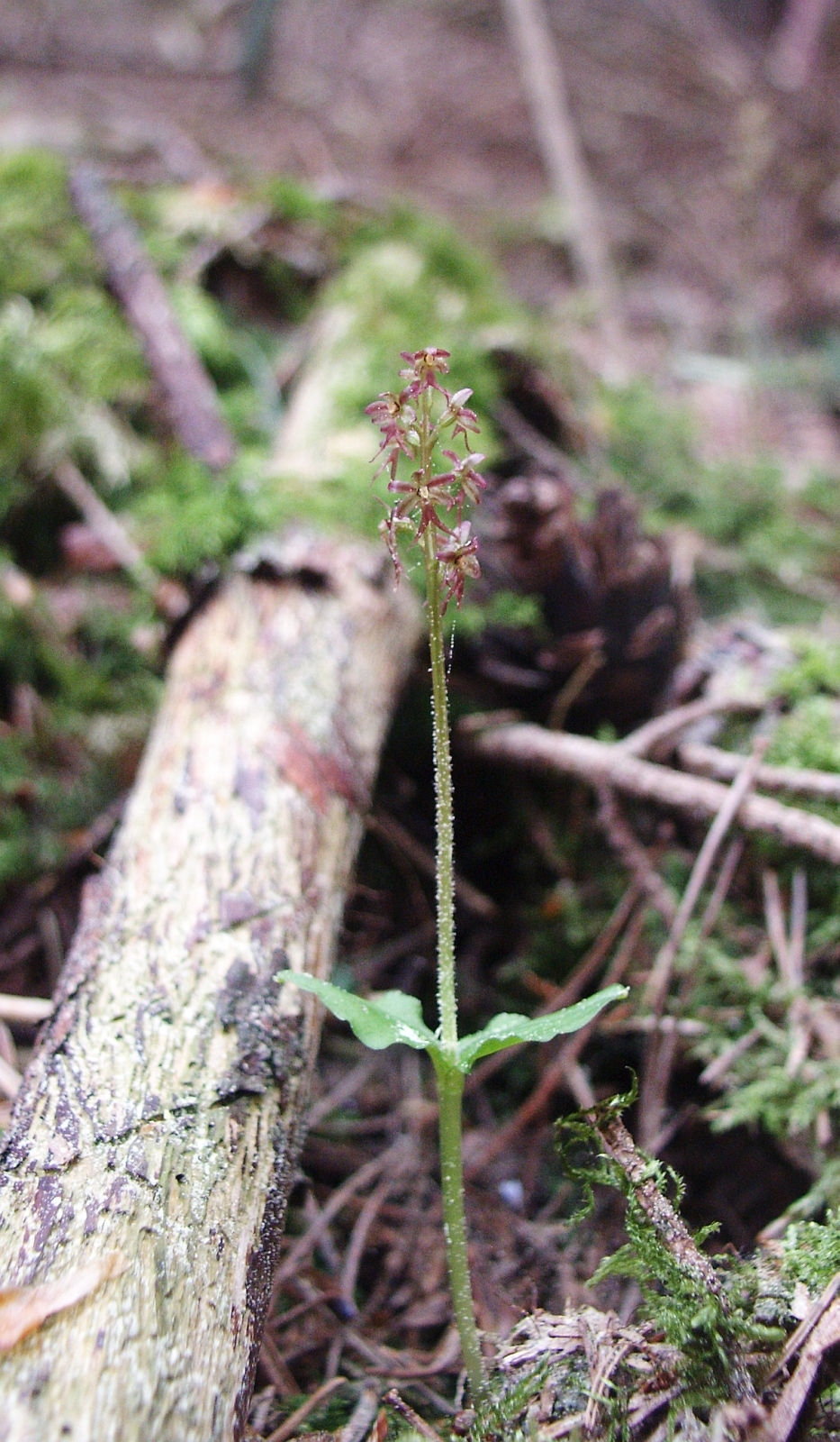 Listera cordata, nördlicher Schwarzwald, Germany